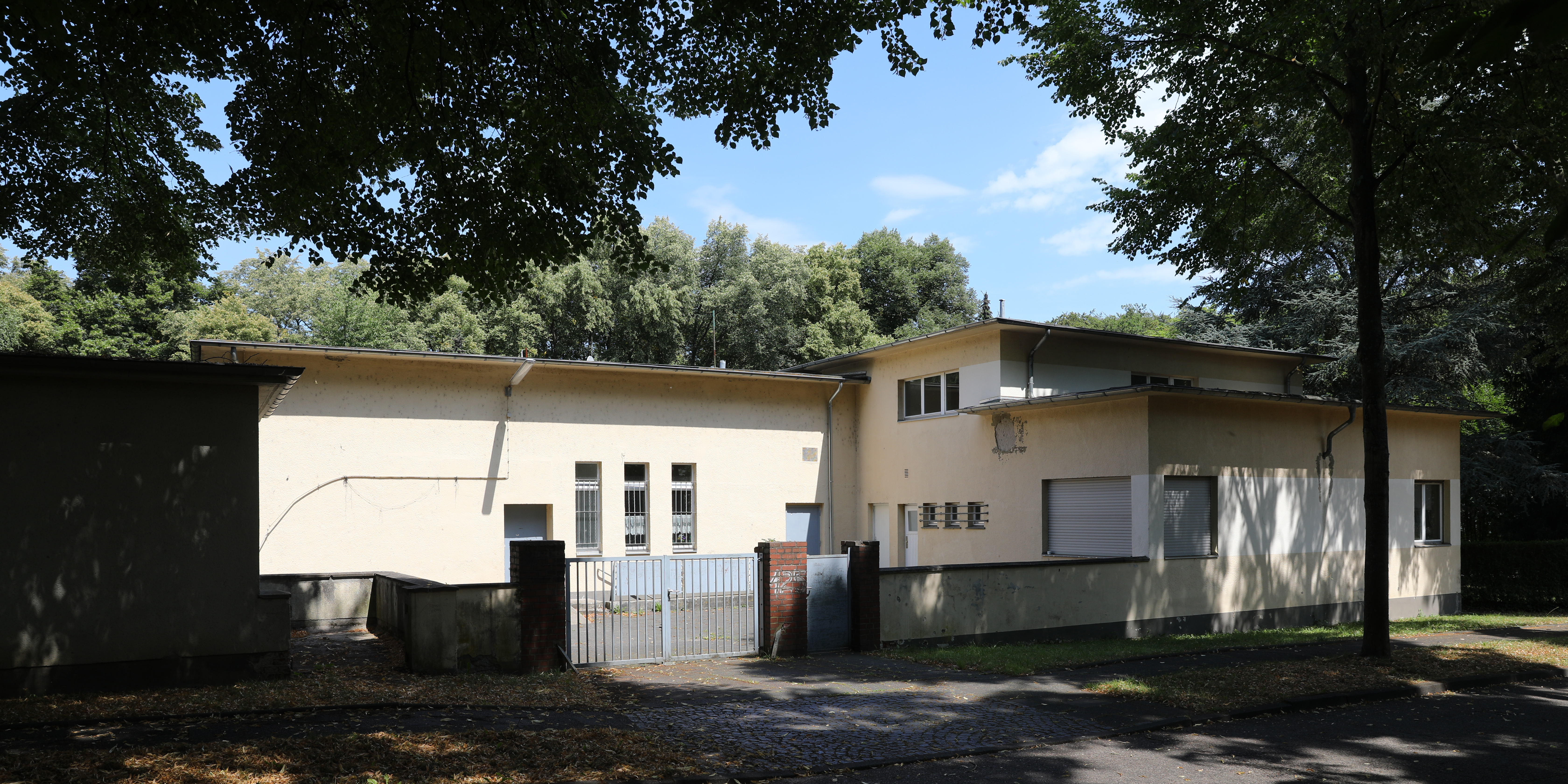 Ehemaliges Funkhaus der WERAG (Vorläufergesellschaft des WDR), Köln-Raderthal Hitzelerstraße 125, Englische Siedlung This is a photograph of an architectural monument.